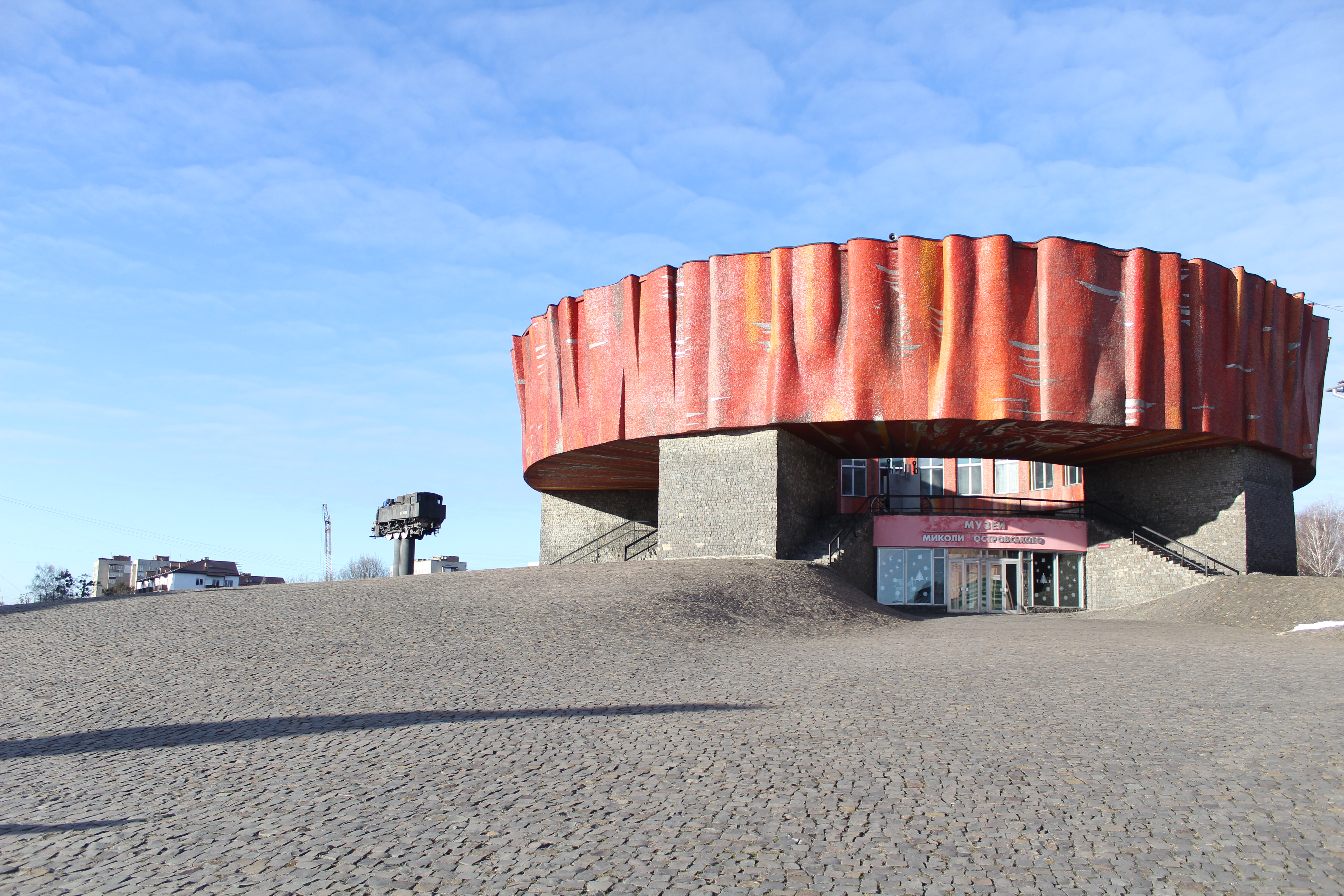 Музей М. Островського, Шепетівка, вул. Островського, 2